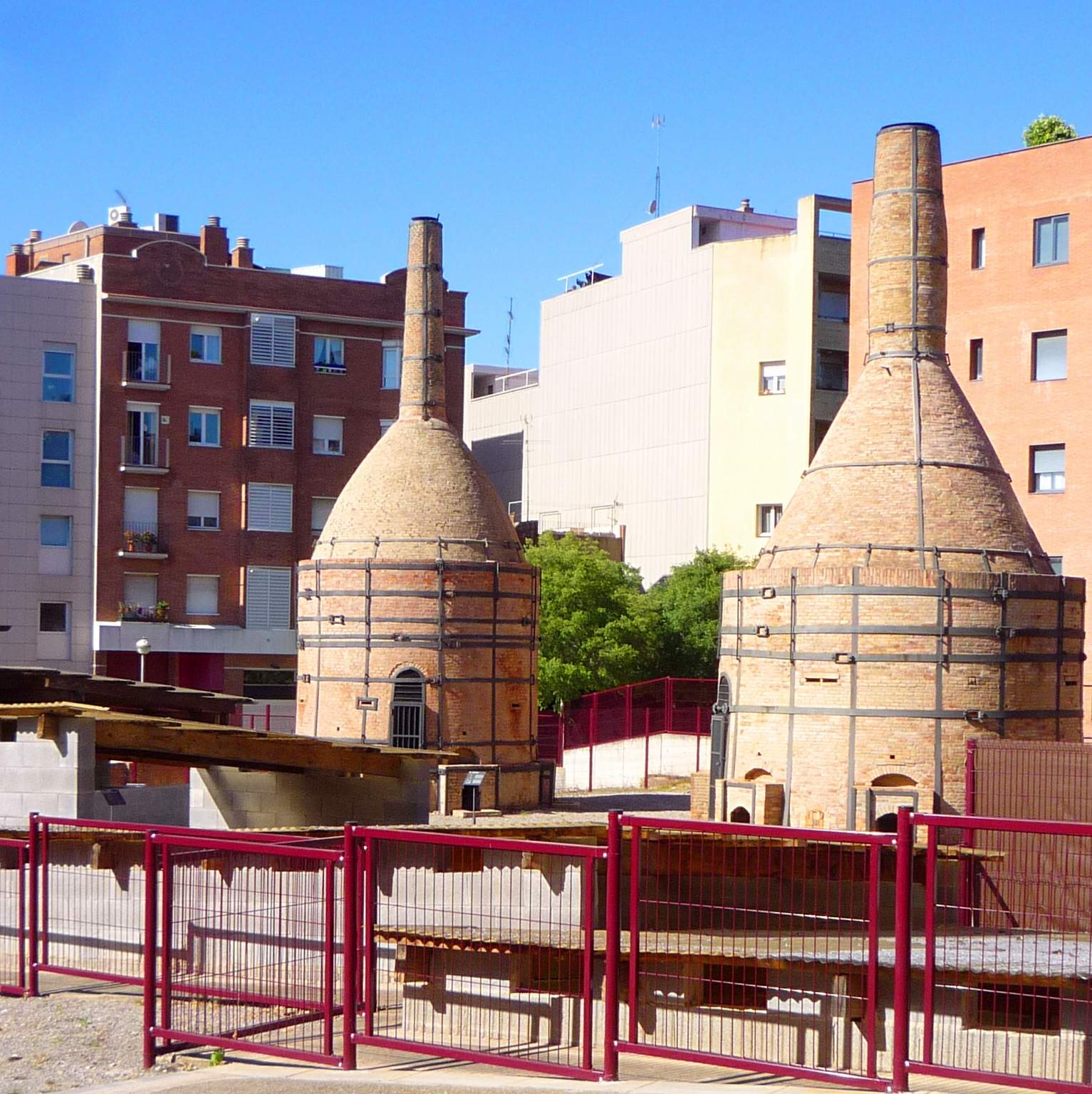 Esplugues de Llobregat - Museu de Ceràmica 'La Rajoleta'